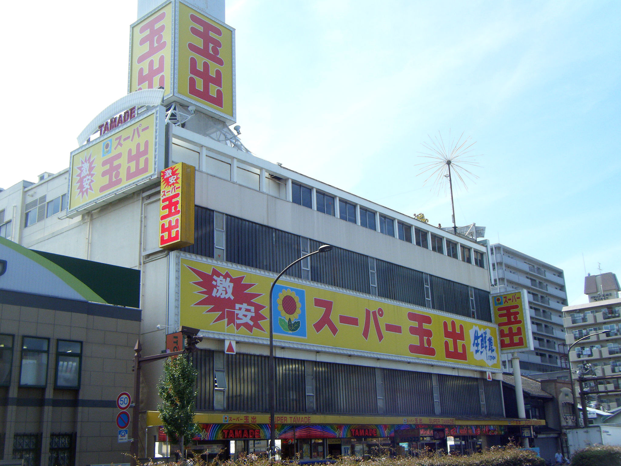 スーパー玉出尼崎店